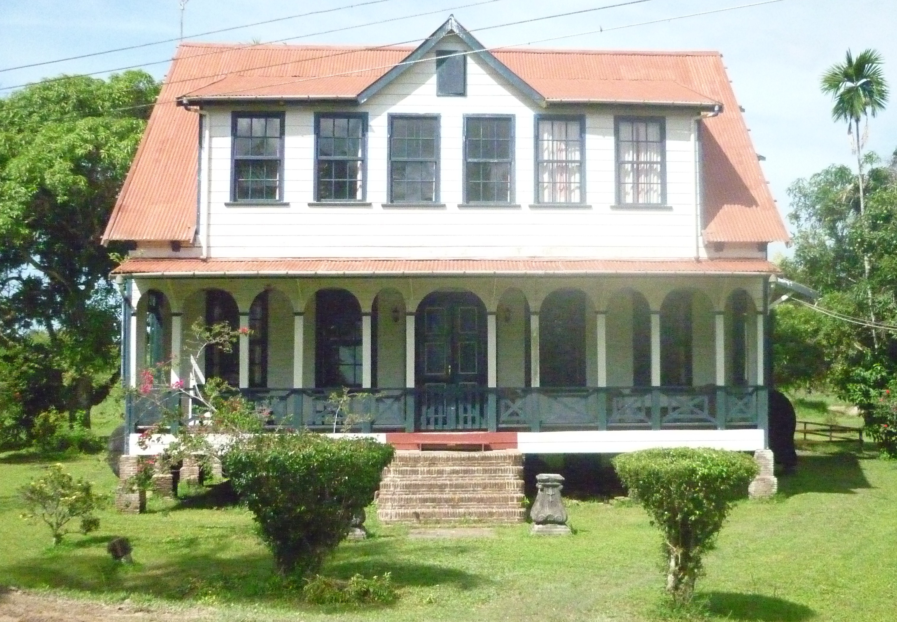 Directeurswoning op plantage Frederiksdorp, Suriname